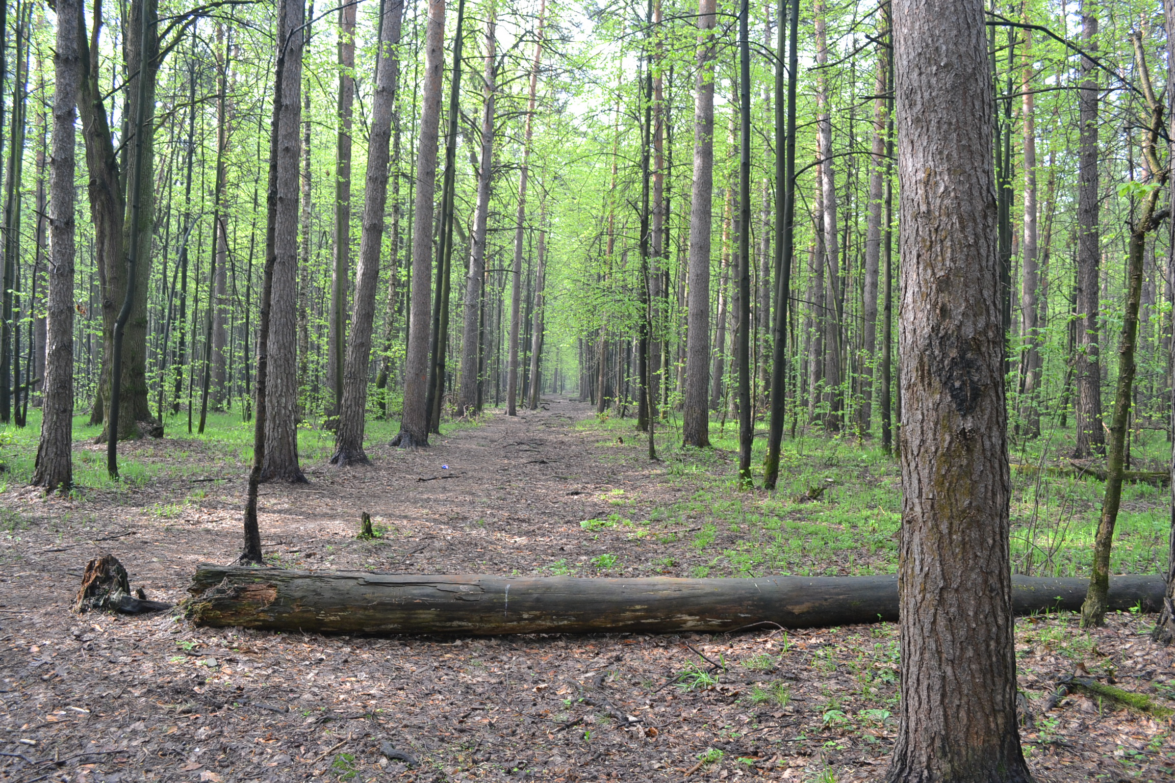 Просека